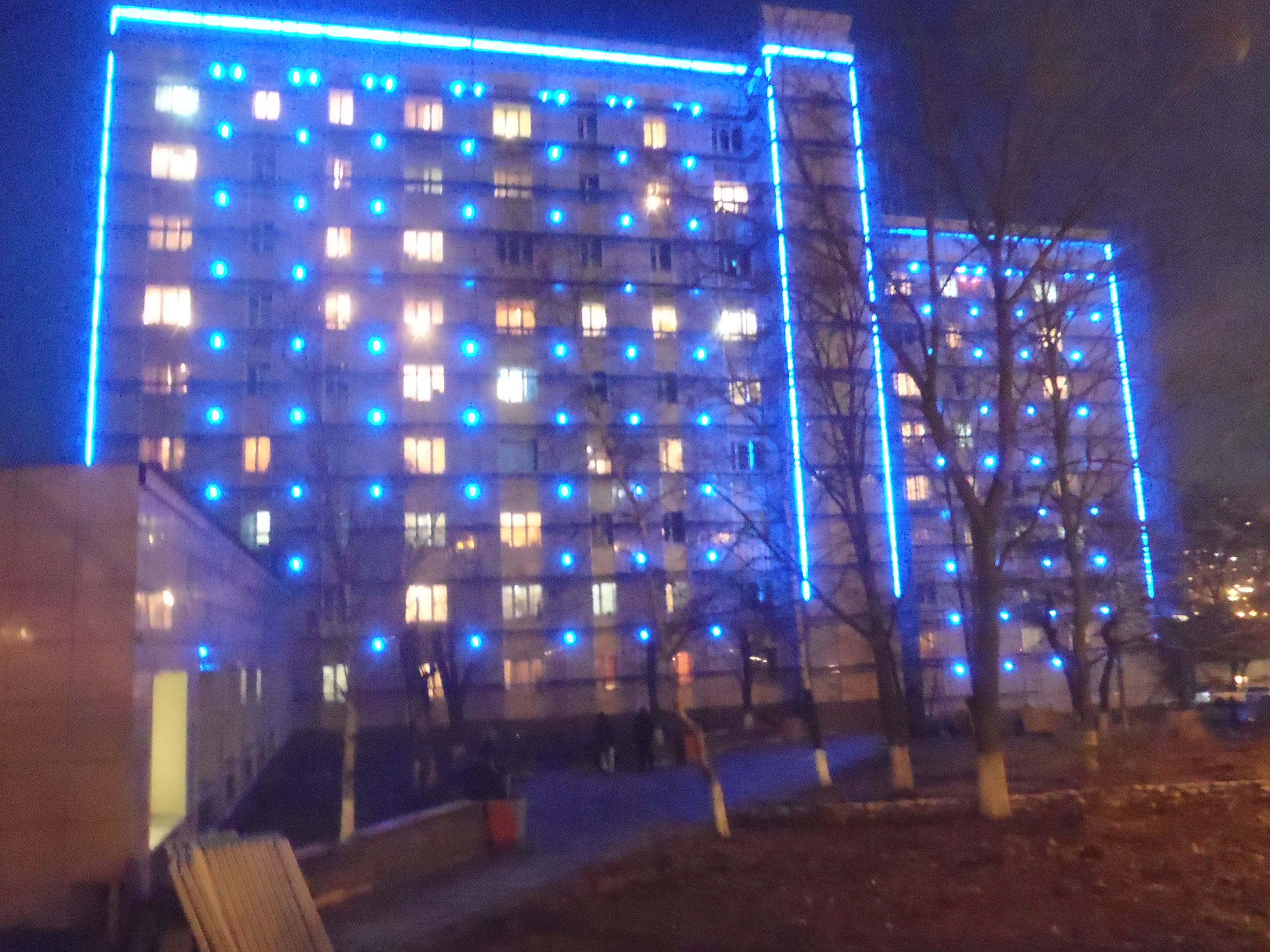 Общежитие ВГМУ №3 с вечерней иллюминацией